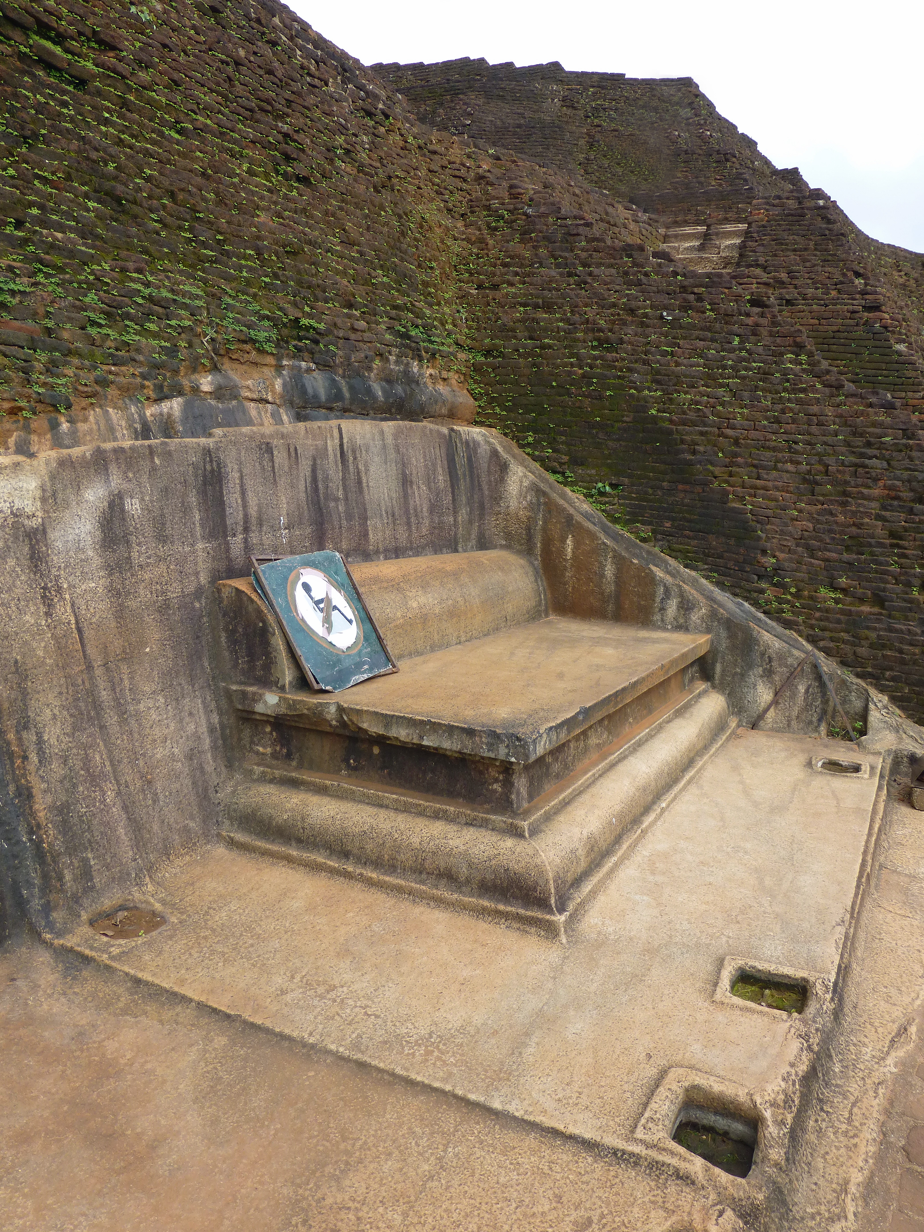 Sigiriya (Sri Lanka) : le trône